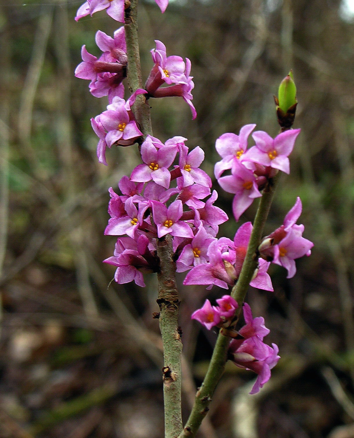 Paprastasis žalčialunkis 2008 m. kovo 9 d., Lietuva